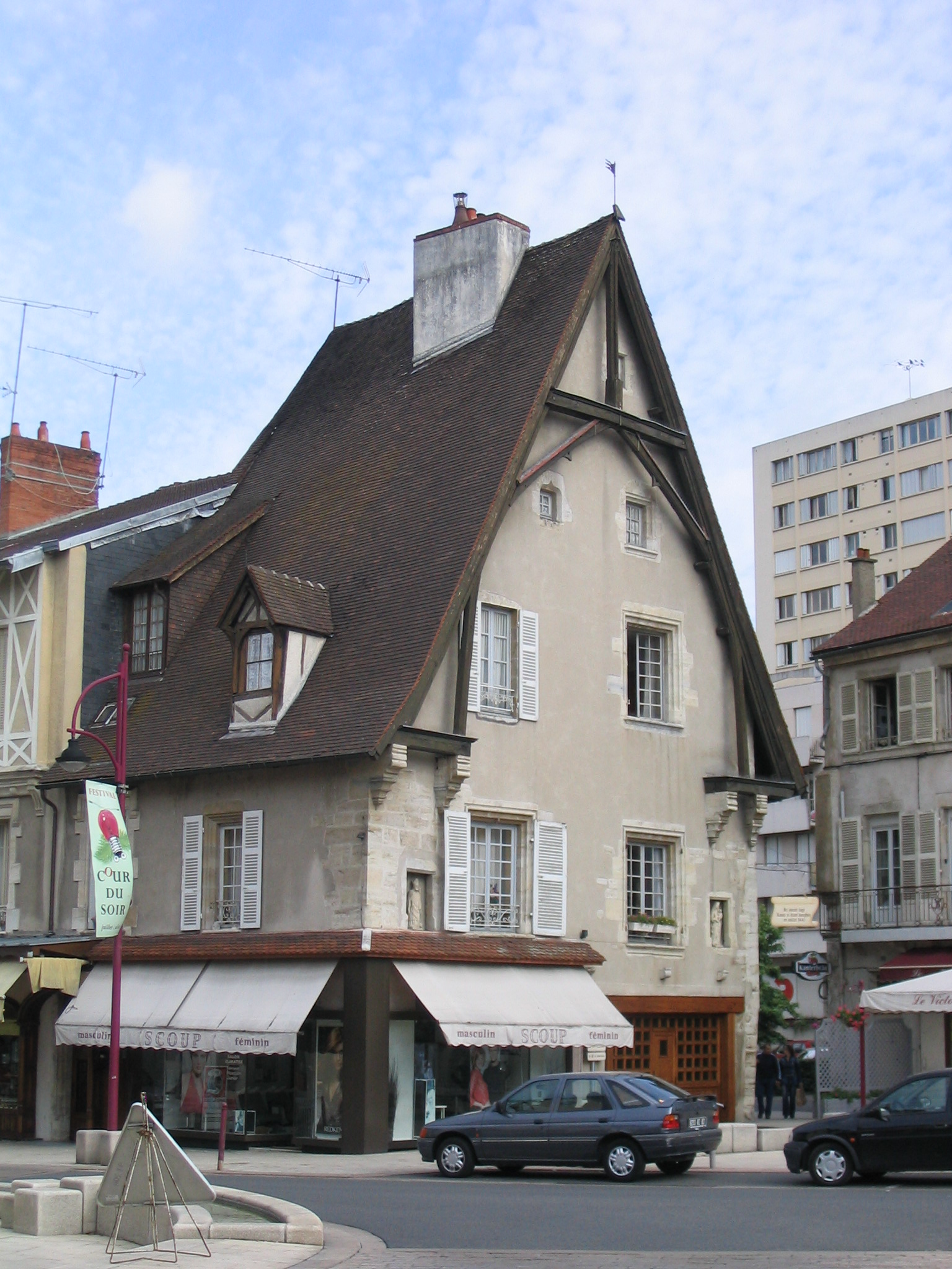 Maison du XVe siècle, place Victor Hugo, à Cusset. House of XV century. Author:Tej